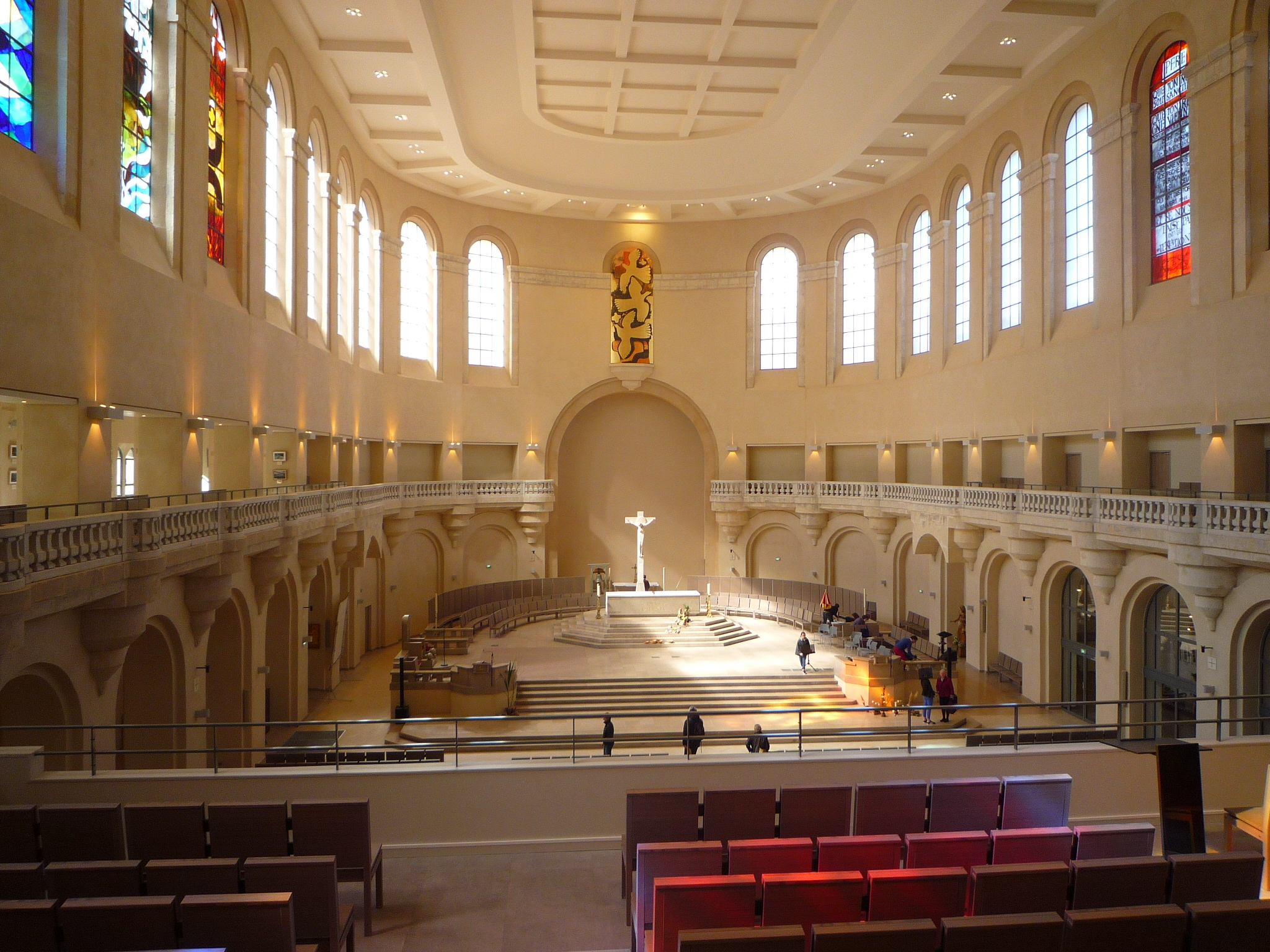 Basilique du Sacré Cœur - Grenoble